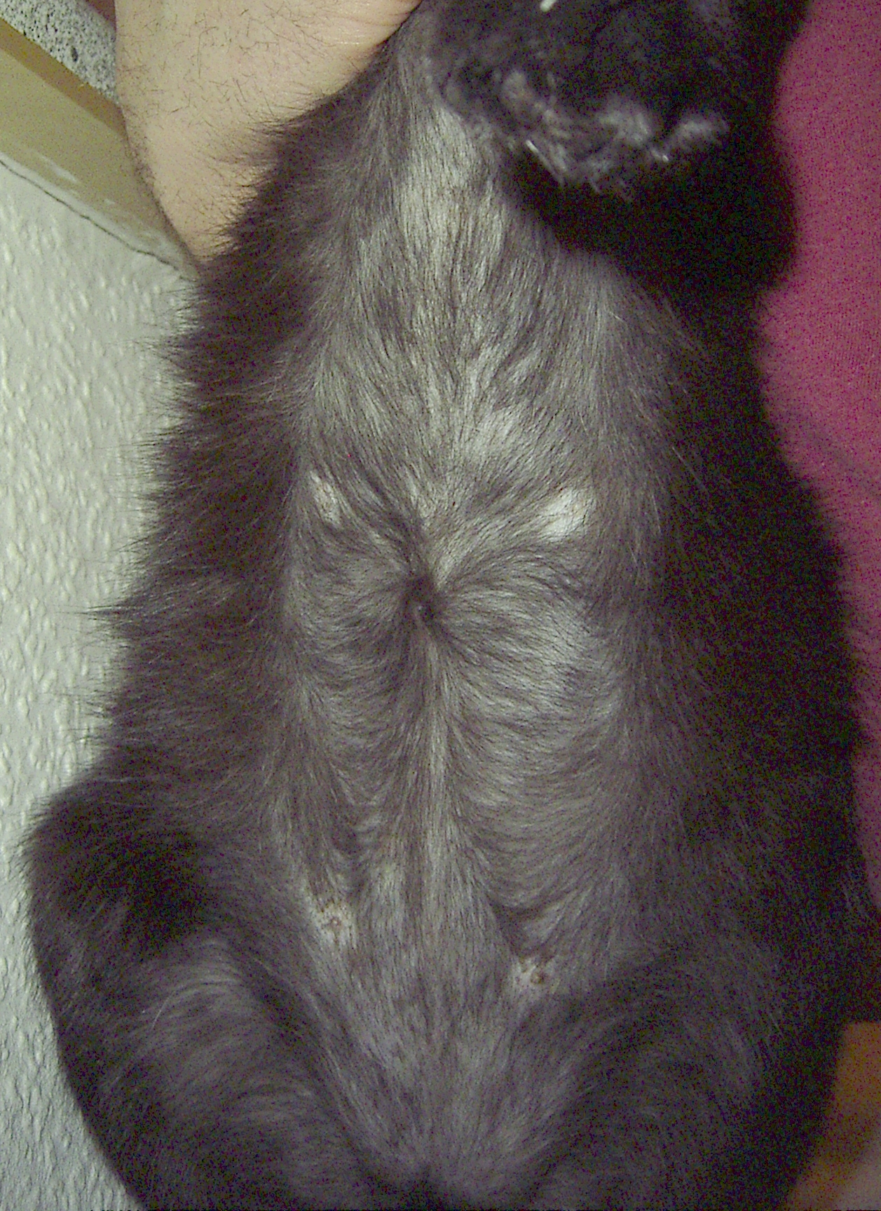 Alopecia